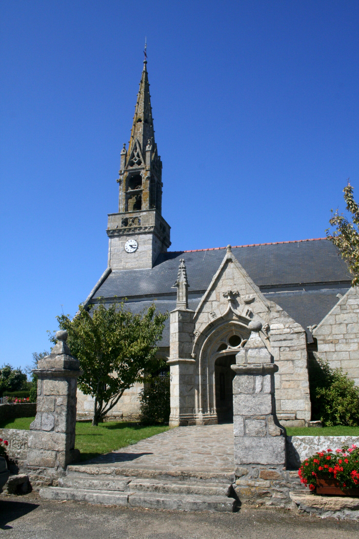 Eglise de Goulien Patrimoine du Finistère